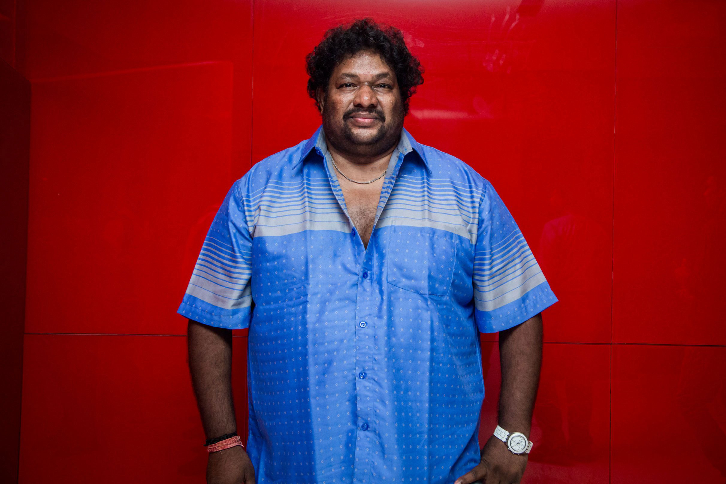 Srikanth Deva at Bongu Audio Launch